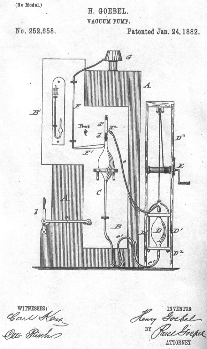 Zeichnung der Goebel-Vakuumpumpe vom Patentblatt des US-Patentamtes